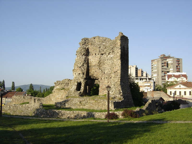 Don Zon tower in Kruševac, Serbia/La tour Don Zon à Kruševac, Serbie